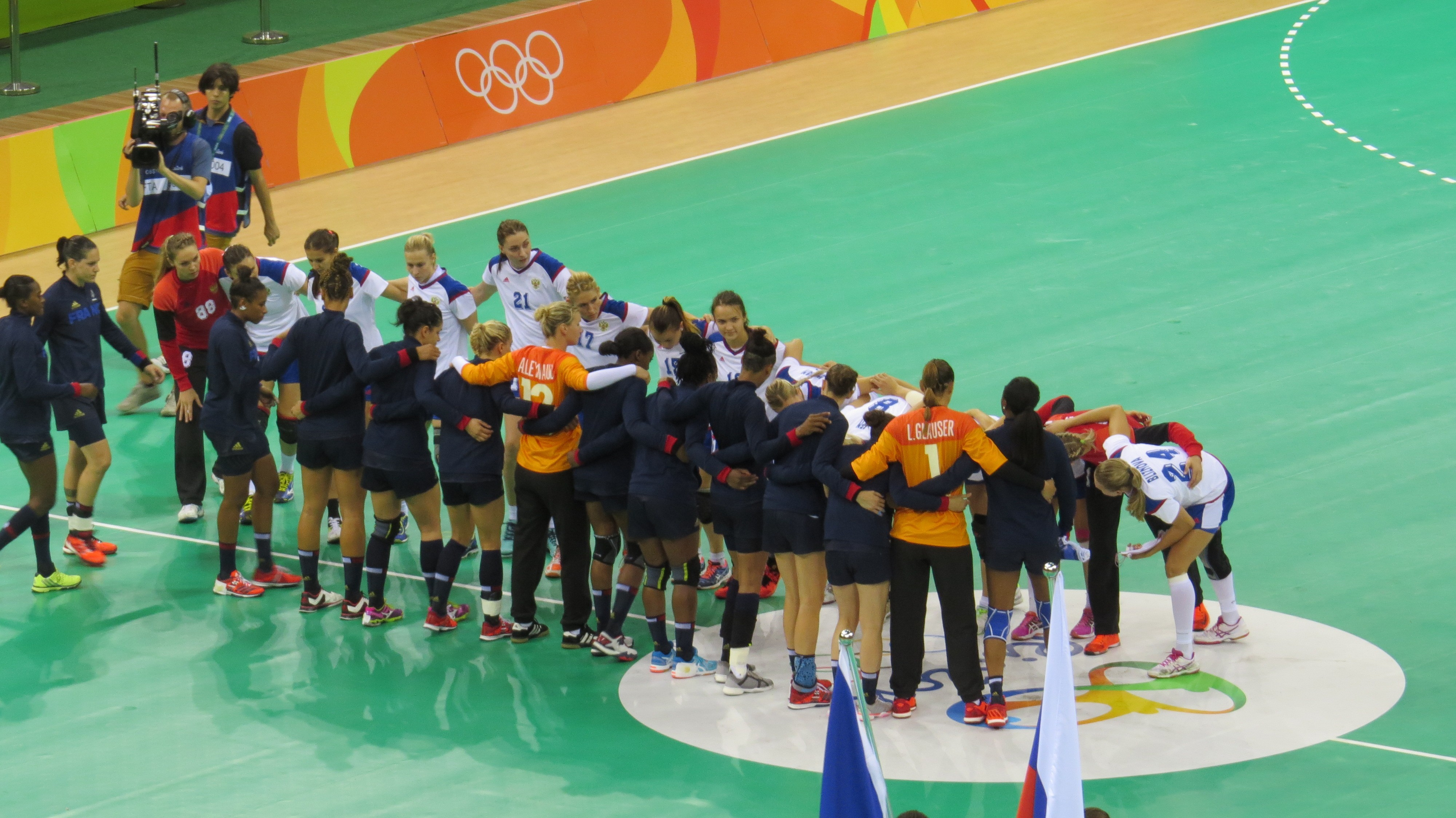 Rio 2016. sx 94